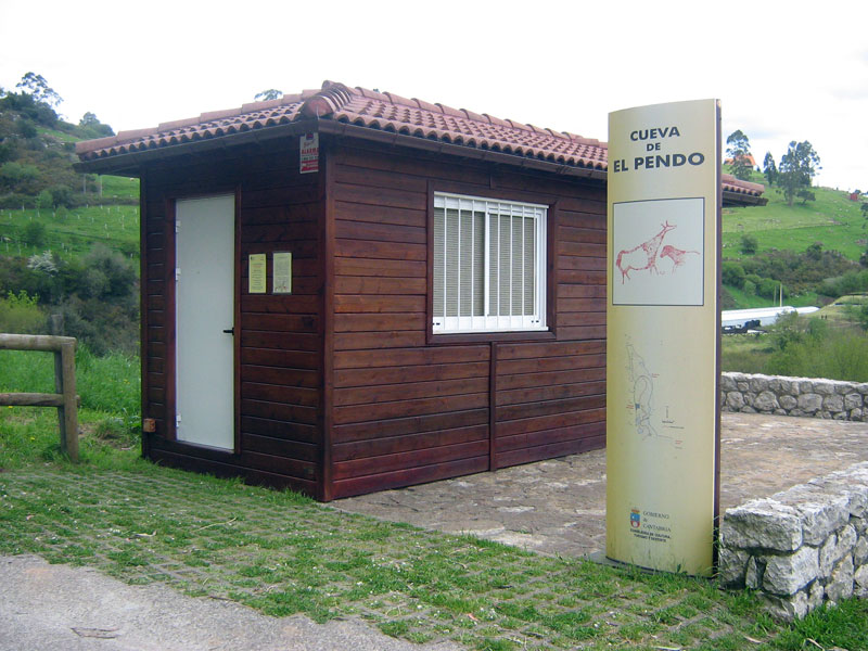 Caseta del guía que organiza las visitas a la cueva cántabra de El Pendo. En ella se adquieren entradas, folletos y se pueden contemplar algunos paneles con información referente a la cueva.